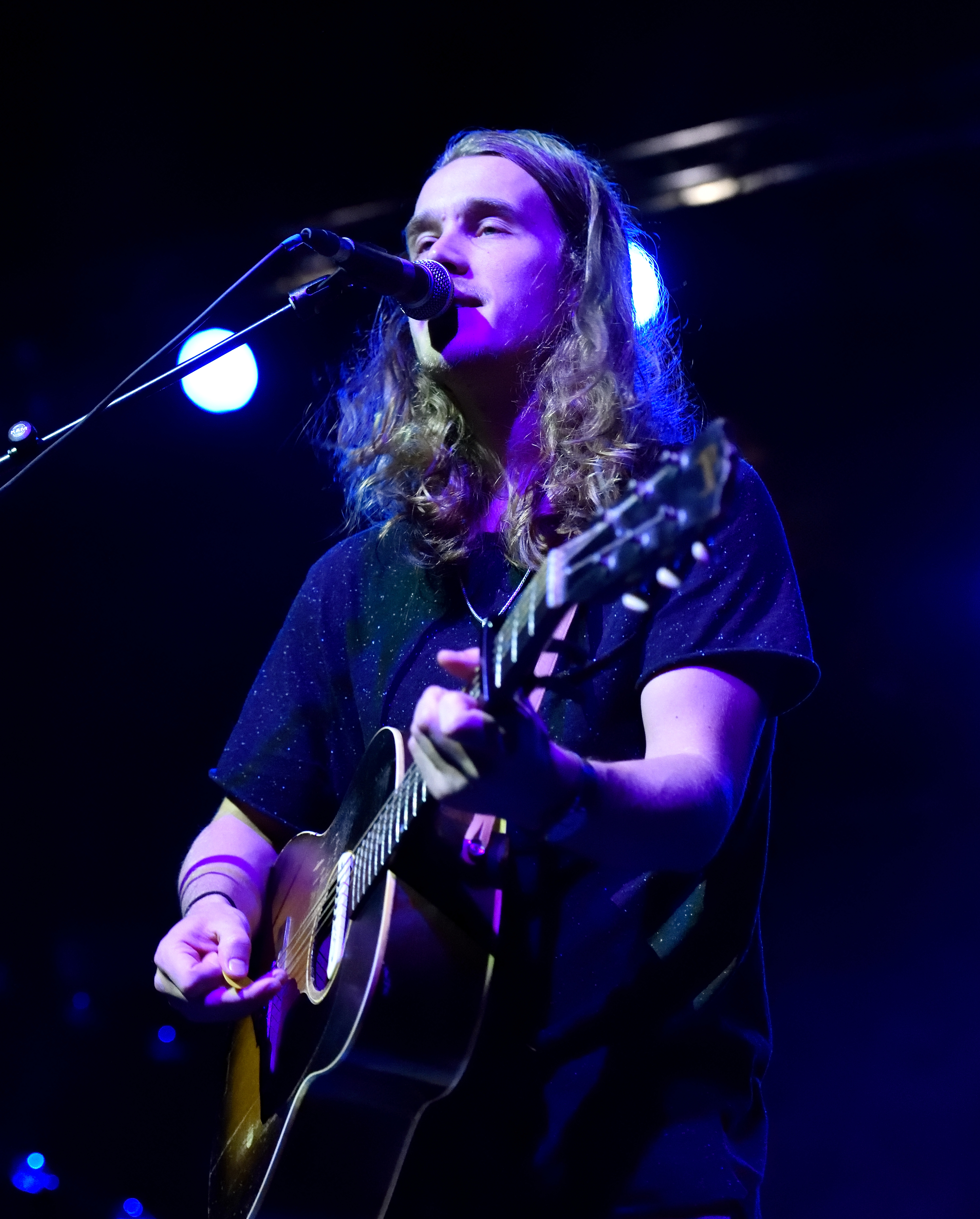 Andreas Moe im Docks Hamburg